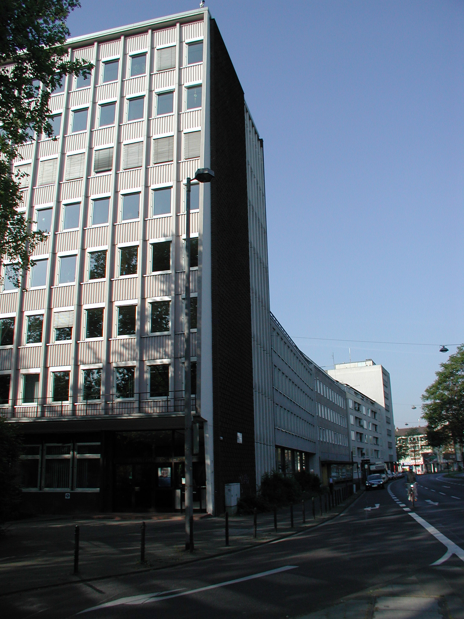 Kölner Bäche, Blaubach, Finanzamt Mitte